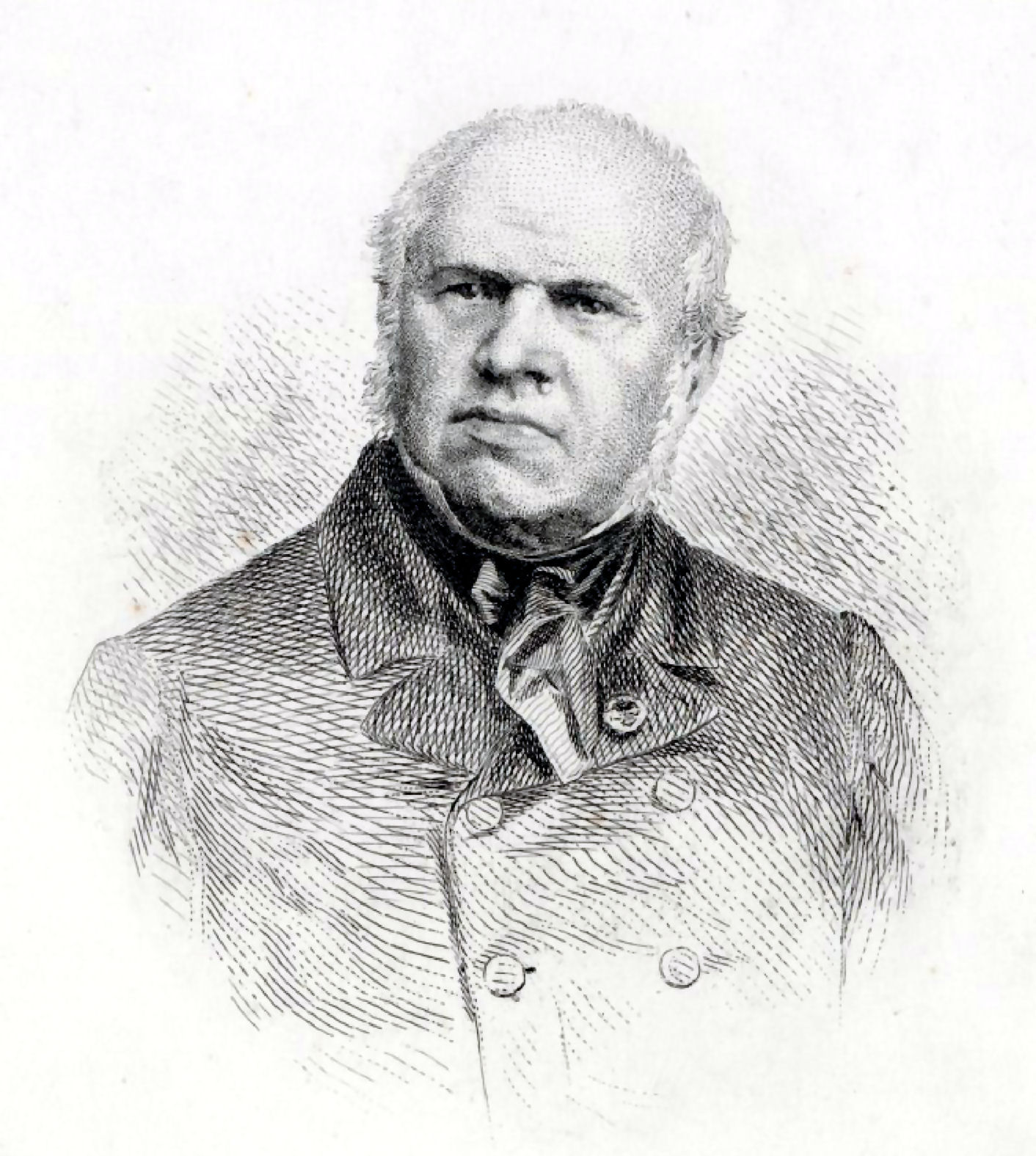 Portait de François-Joseph Fétis